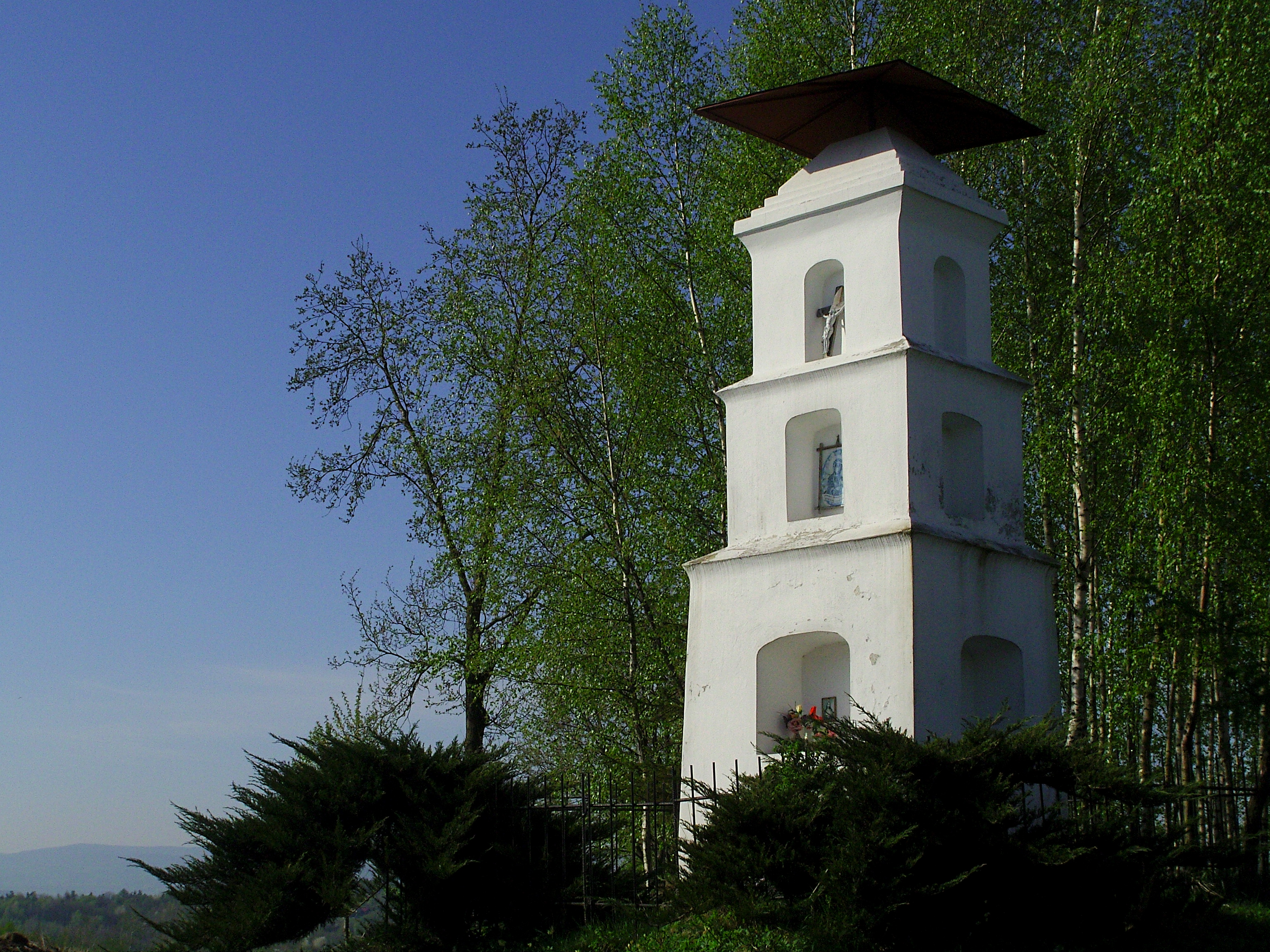 Murowana figura sprzed 1643 roku w Bączalu Dolnym